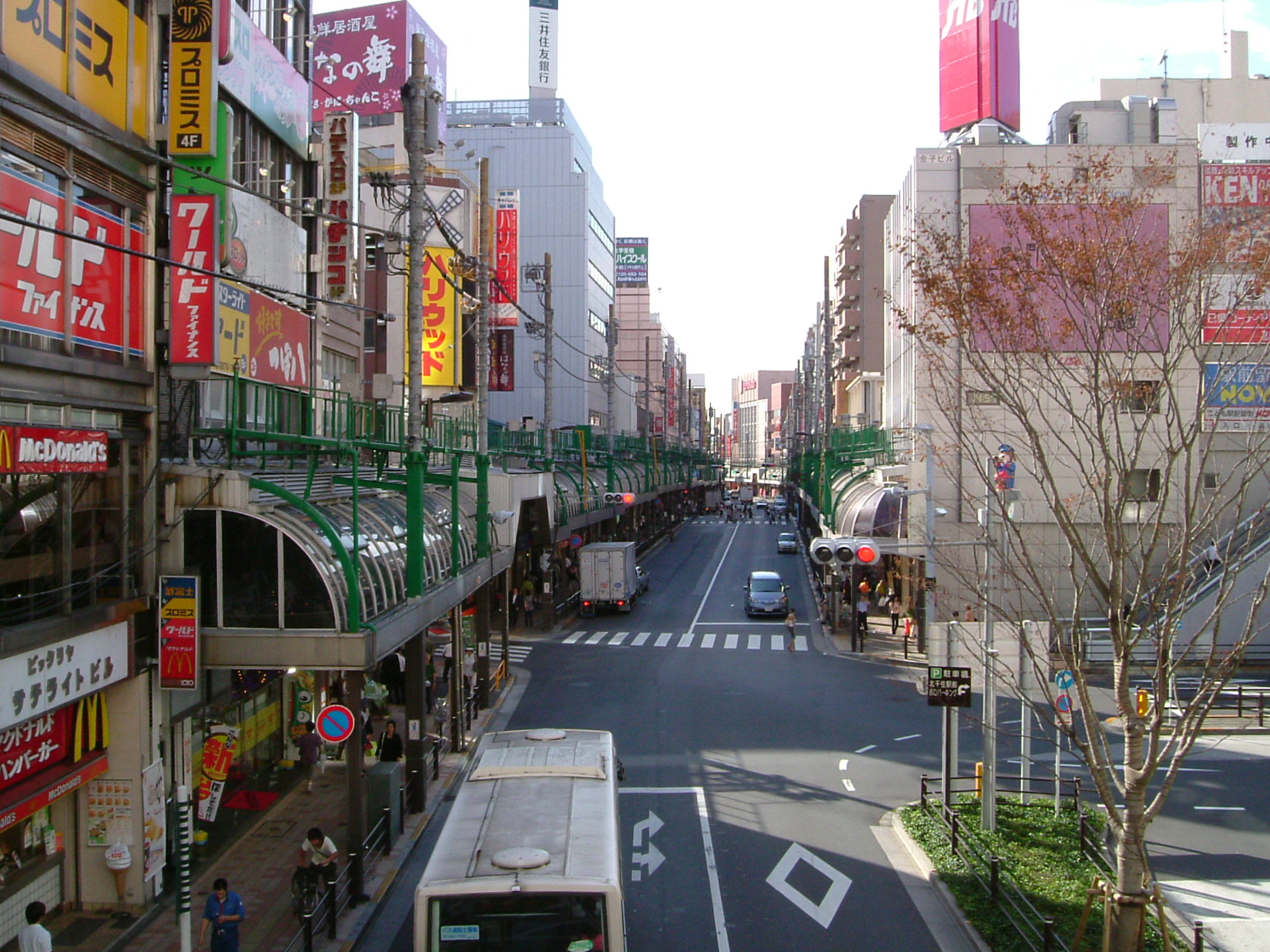 北千住西口